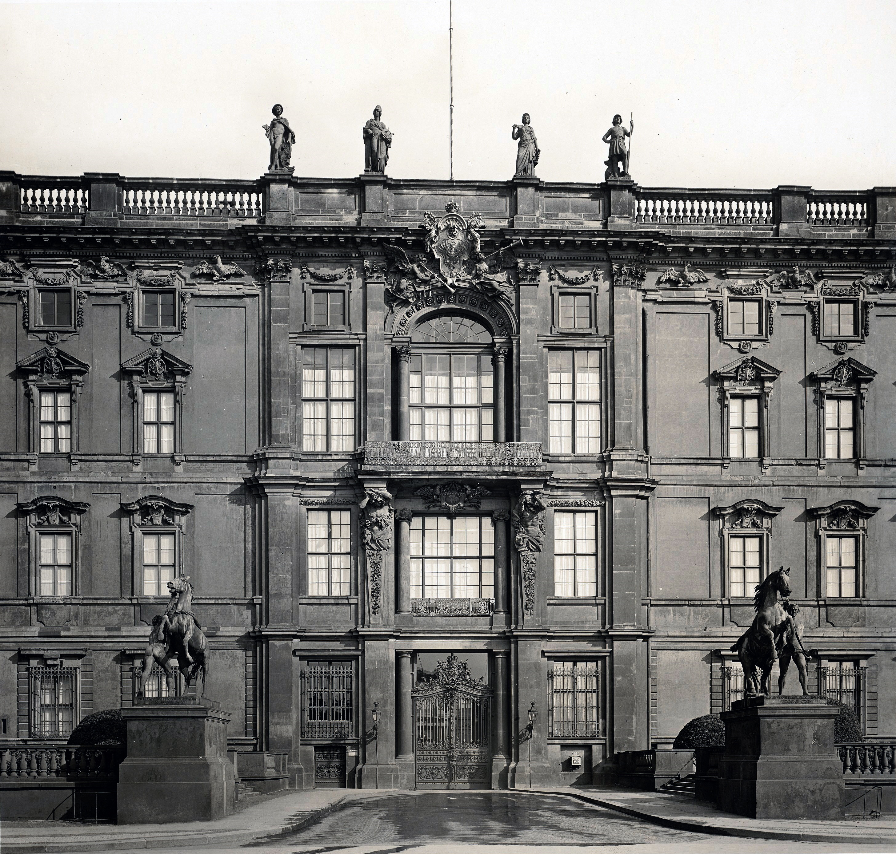 Berliner Stadtschloss, Lustgartenfassade, Portal IV